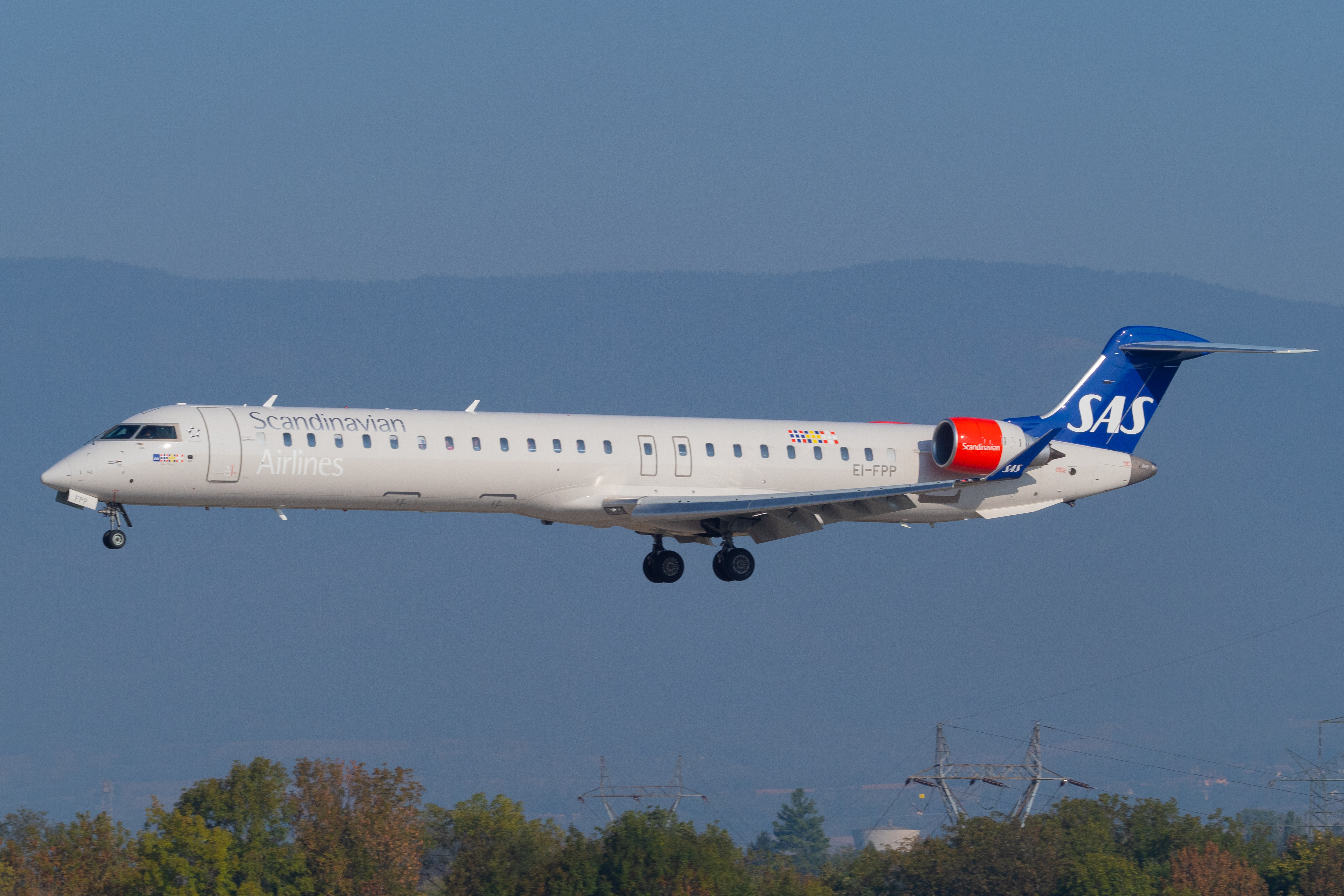 Geneva International Airport